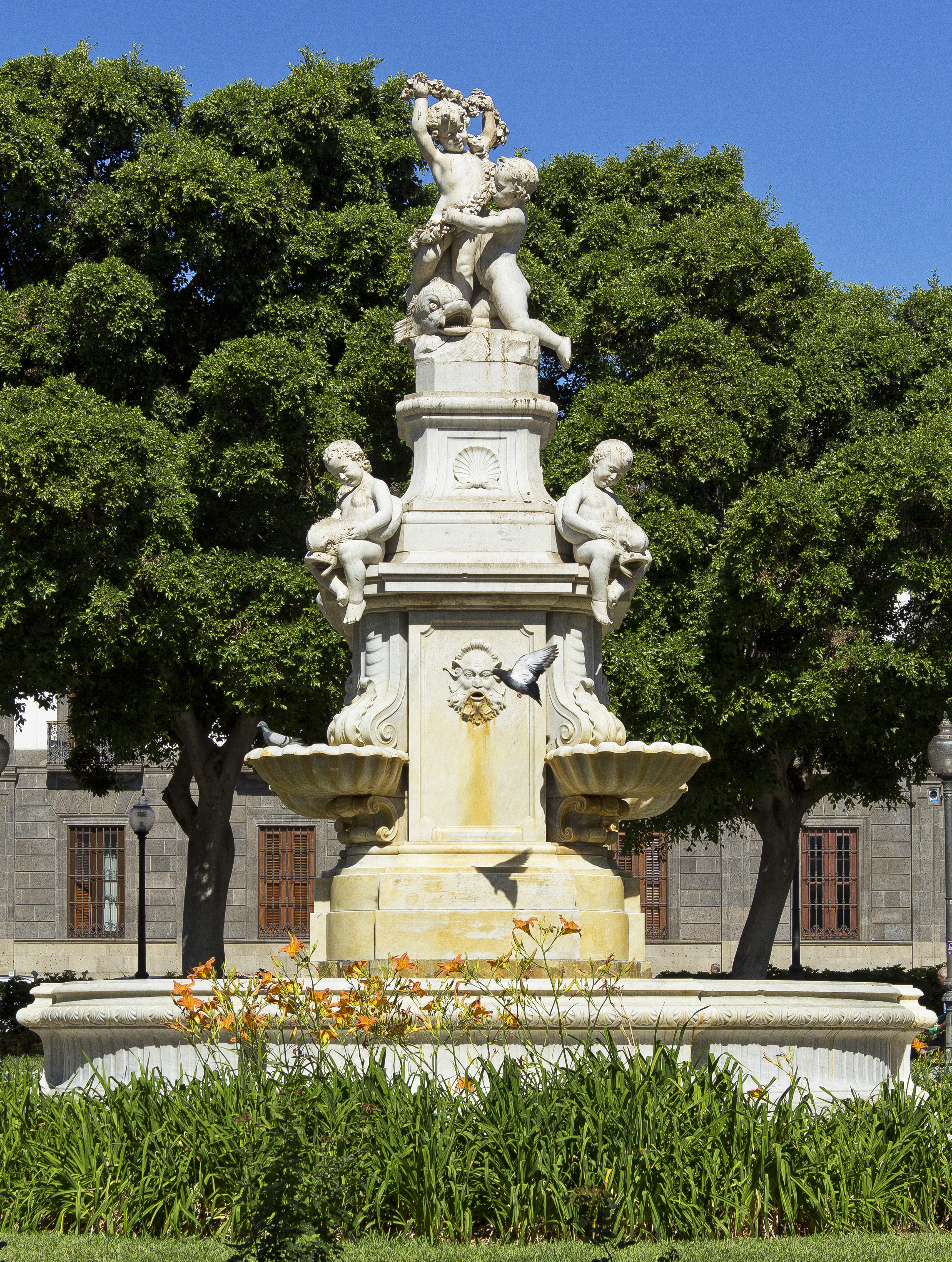 Brunnen auf der Plaza Weyler in Santa Cruz de Tenerife. Der Brunnen wurde von Vincente Armiñon entworfen und im Jahr 1893 fertiggestellt.